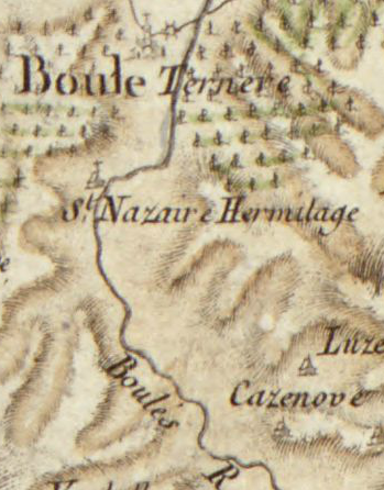 Extrait de carte Cassini montrant St Nazaire de Barbadell comme ermitage